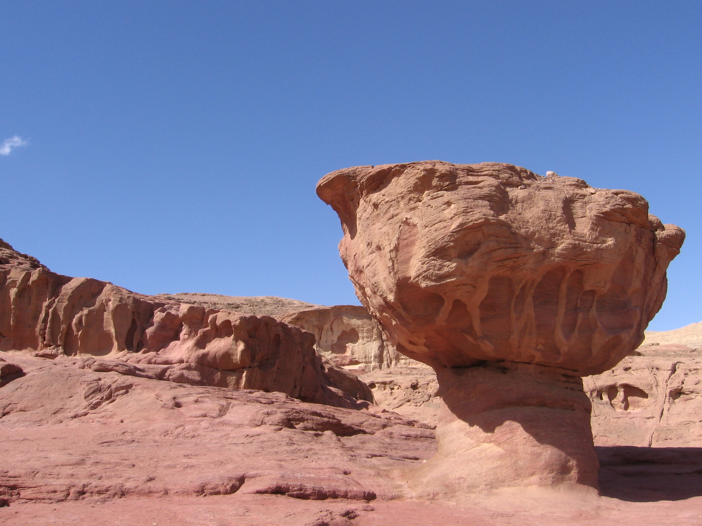 Timna Park, Negev, Israel